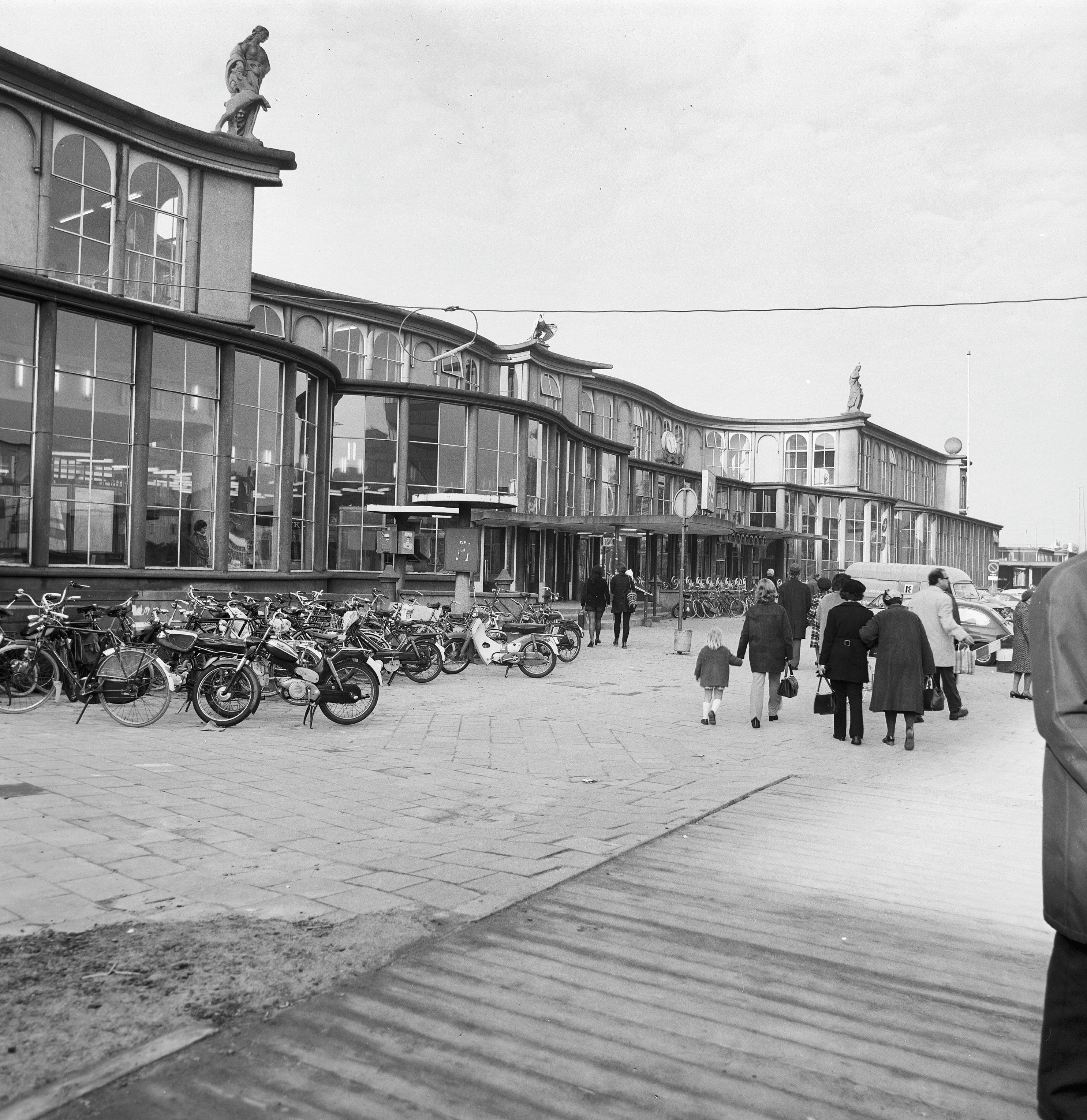 Voormalig Centraal Station: voorgevel